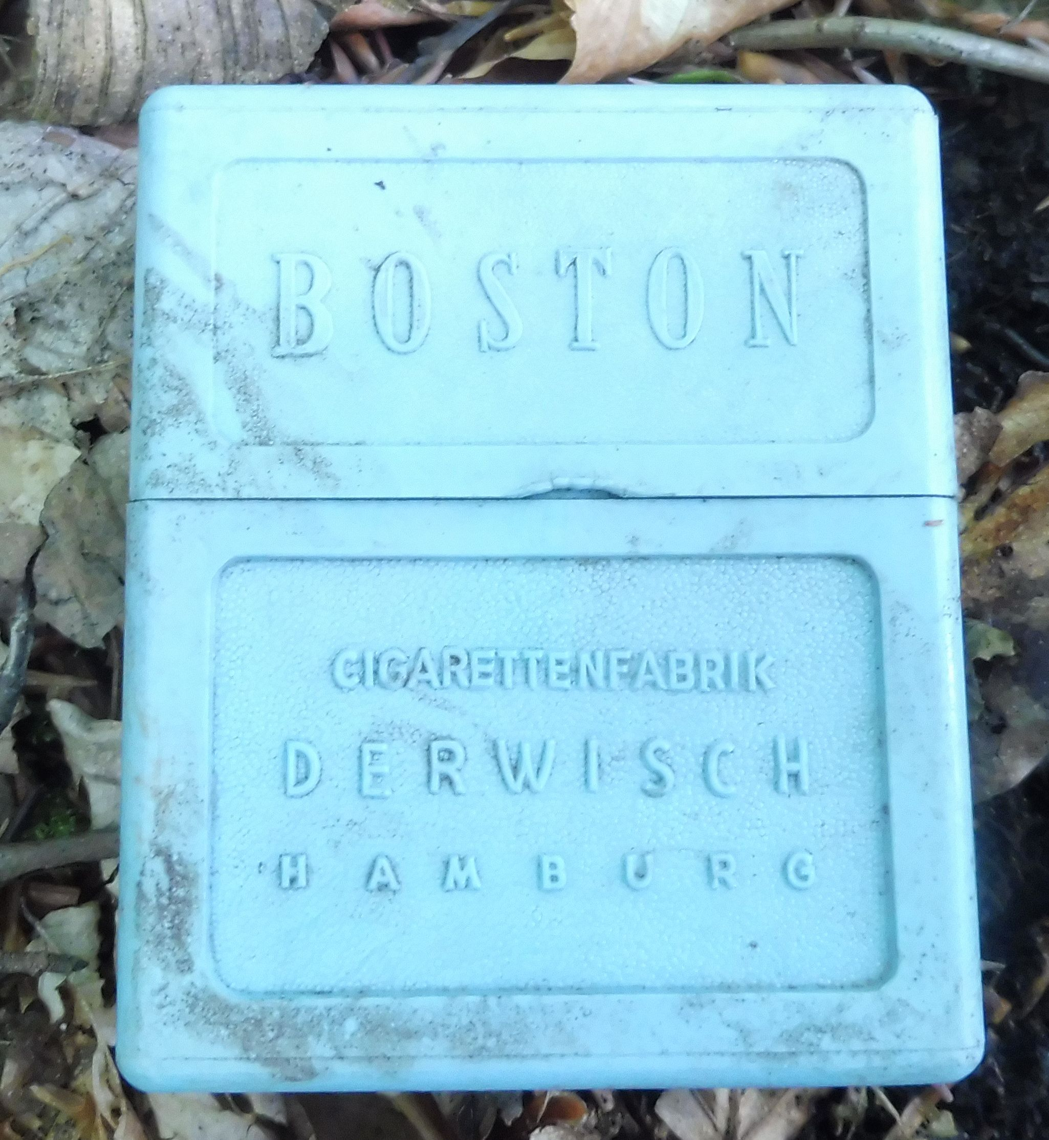 Zigarettenschachtel aus Kunststoff der Marke Boston der Cigarettenfabrik Derwisch